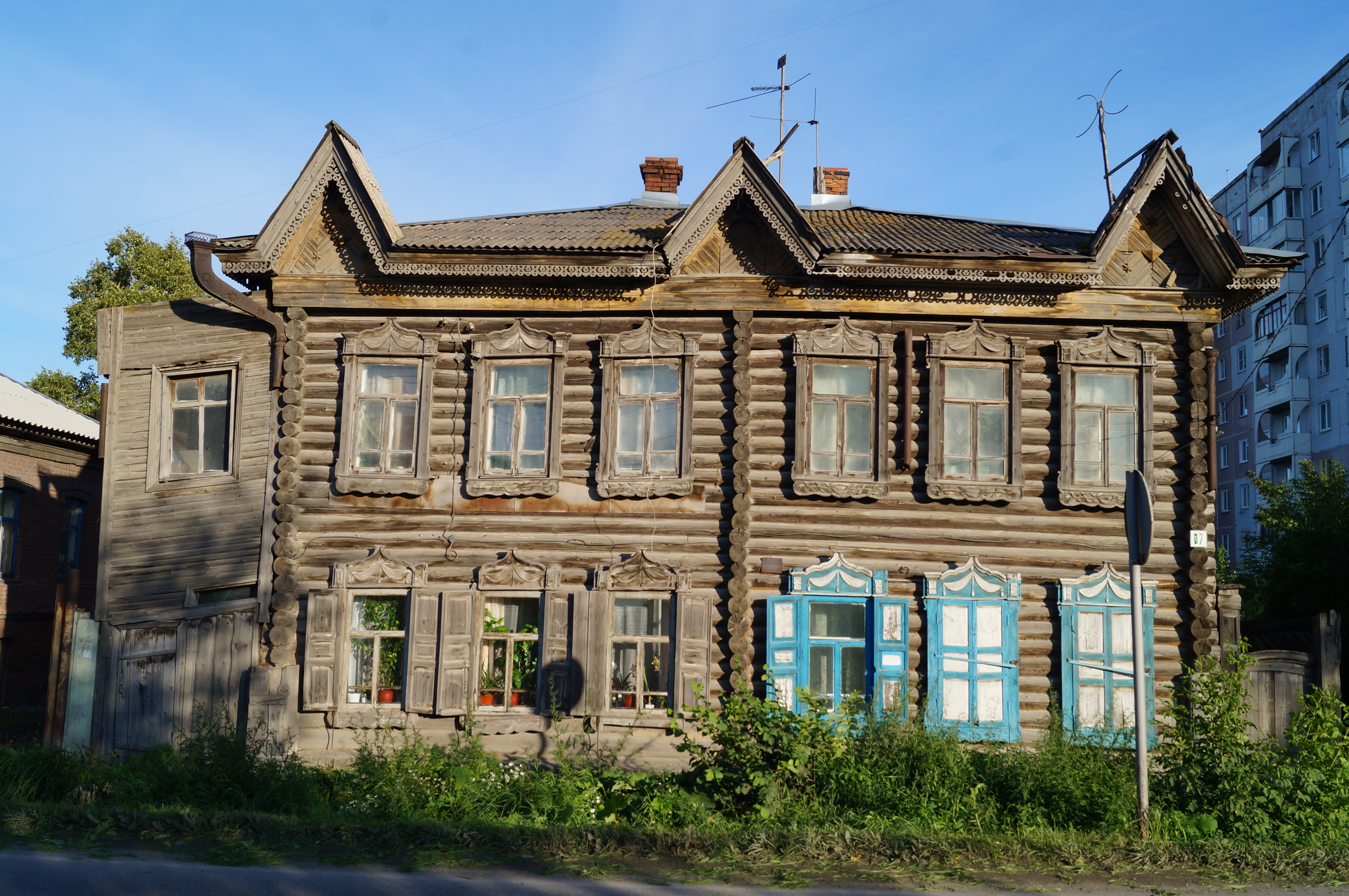 Жилой дом: улица Ленина, 87, Ачинск, Красноярский край